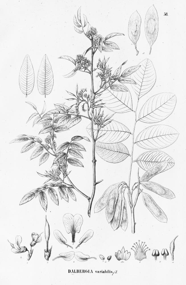 Illustration of Dalbergia frutescens var. tomentosa (Orig. Dalbergia variabilis tomentosa)